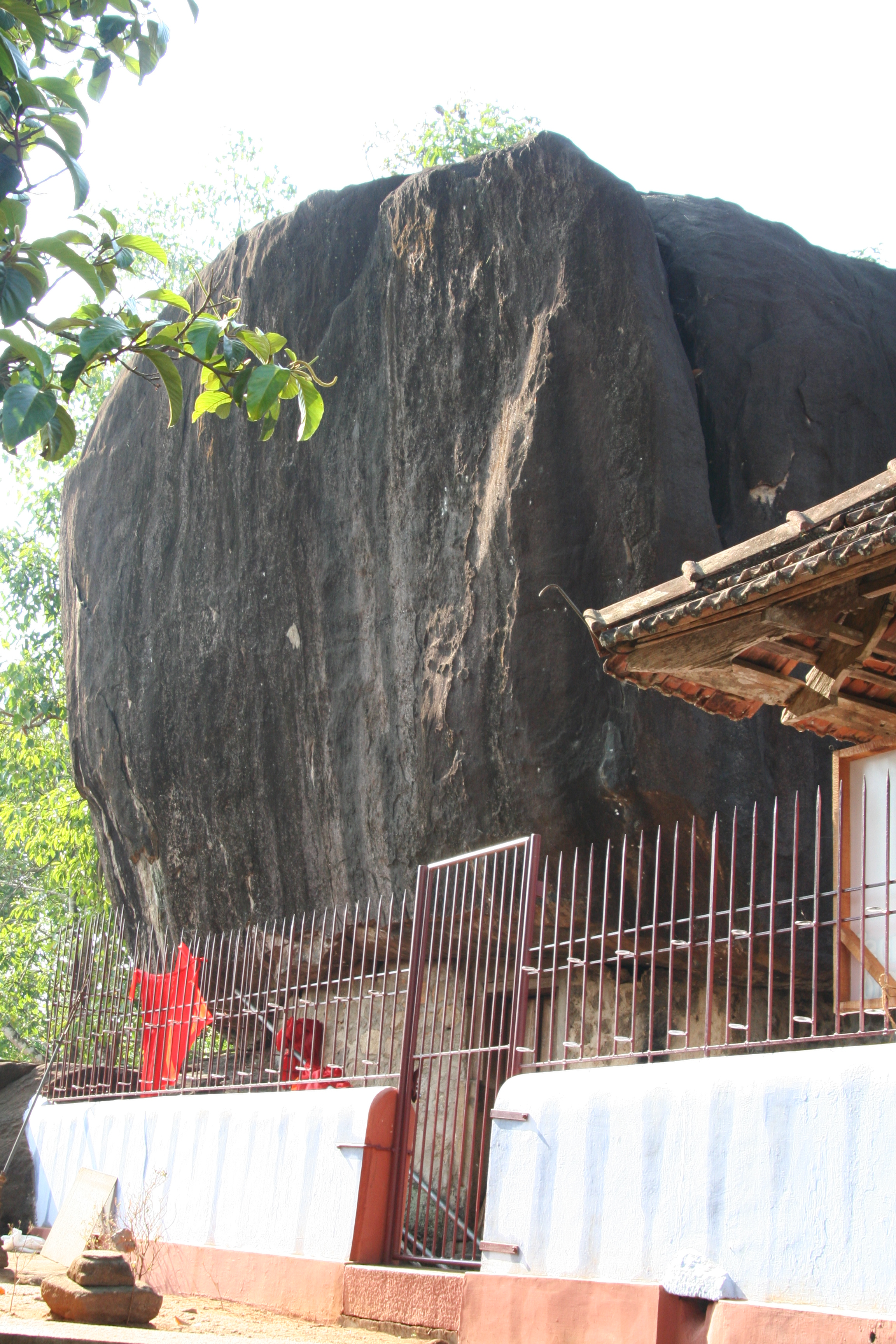 കല്ലിൽ ക്ഷേത്രം. ചിത്രത്തിൽ കാണുന്ന ഭീമാകാരമായ കല്ലിനടിയിലാണ് ശ്രീകോവിൽ. അതുകൊണ്ടുതന്നെയാണ് കല്ലിൽ ക്ഷേത്രം എന്ന പേര് വീണത്.